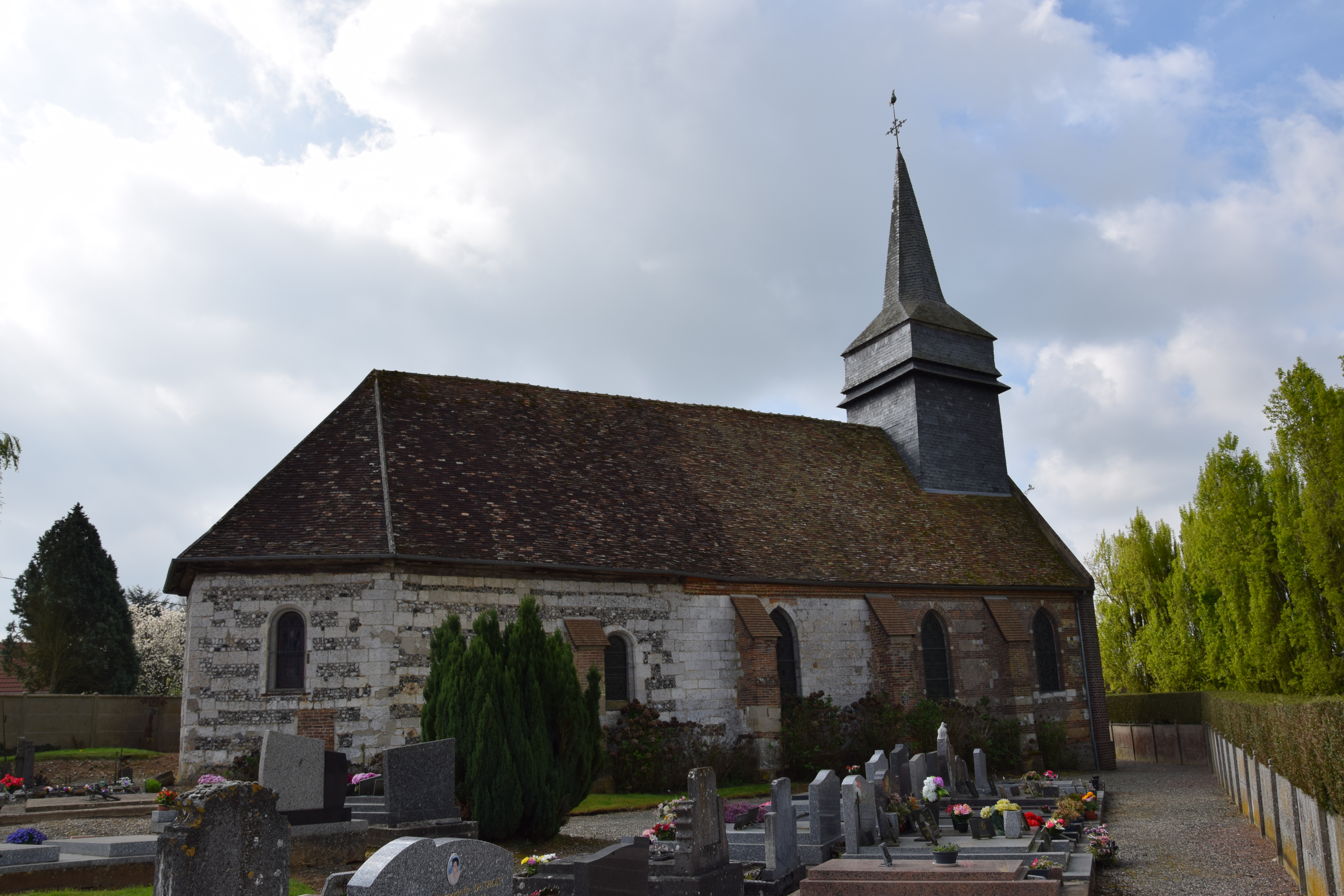 Lalande-en-Son